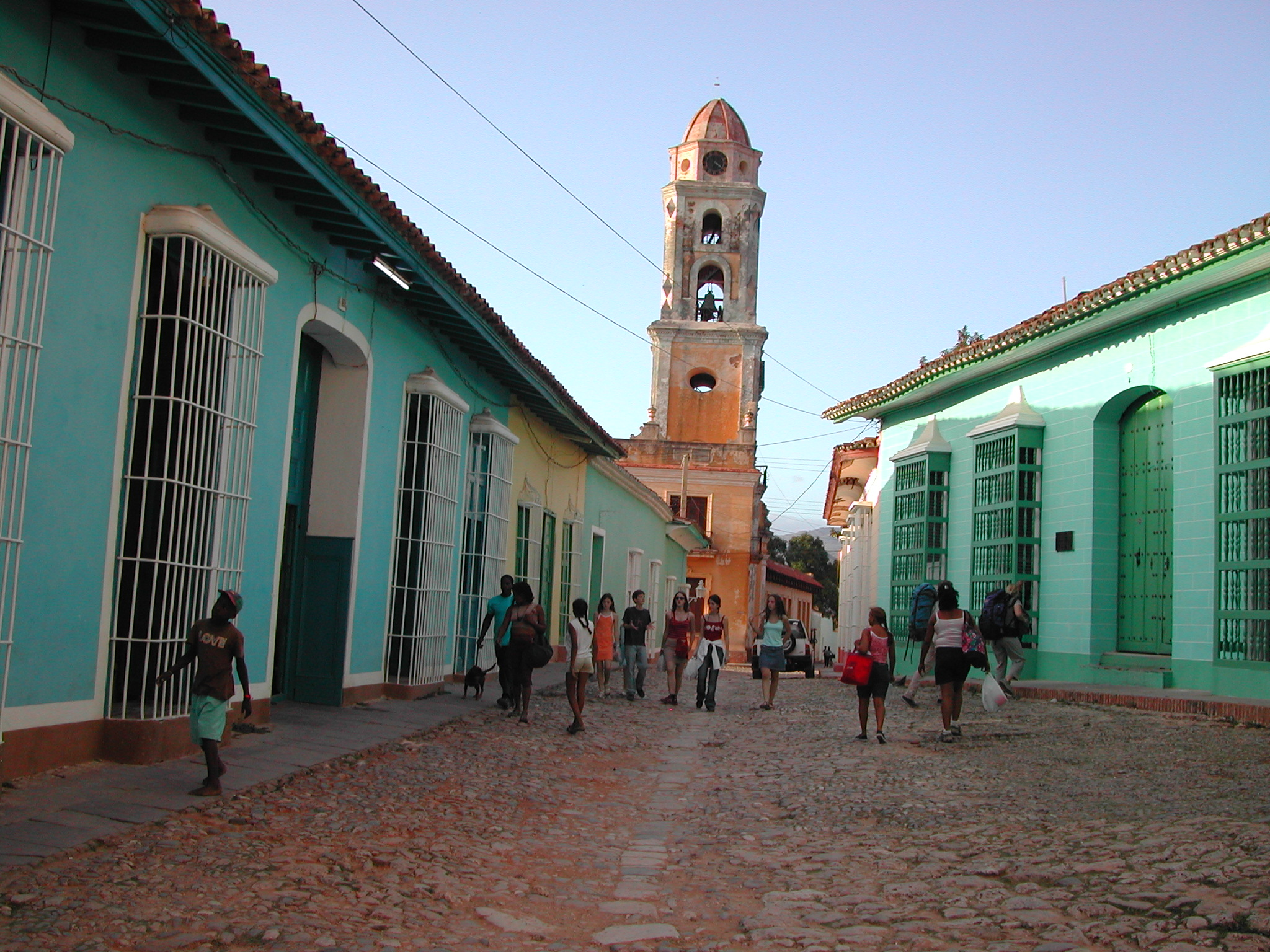 Clocher de l'église St François d'Assise à Trinidad, Cuba. Trinidad (Cuba), Cuba